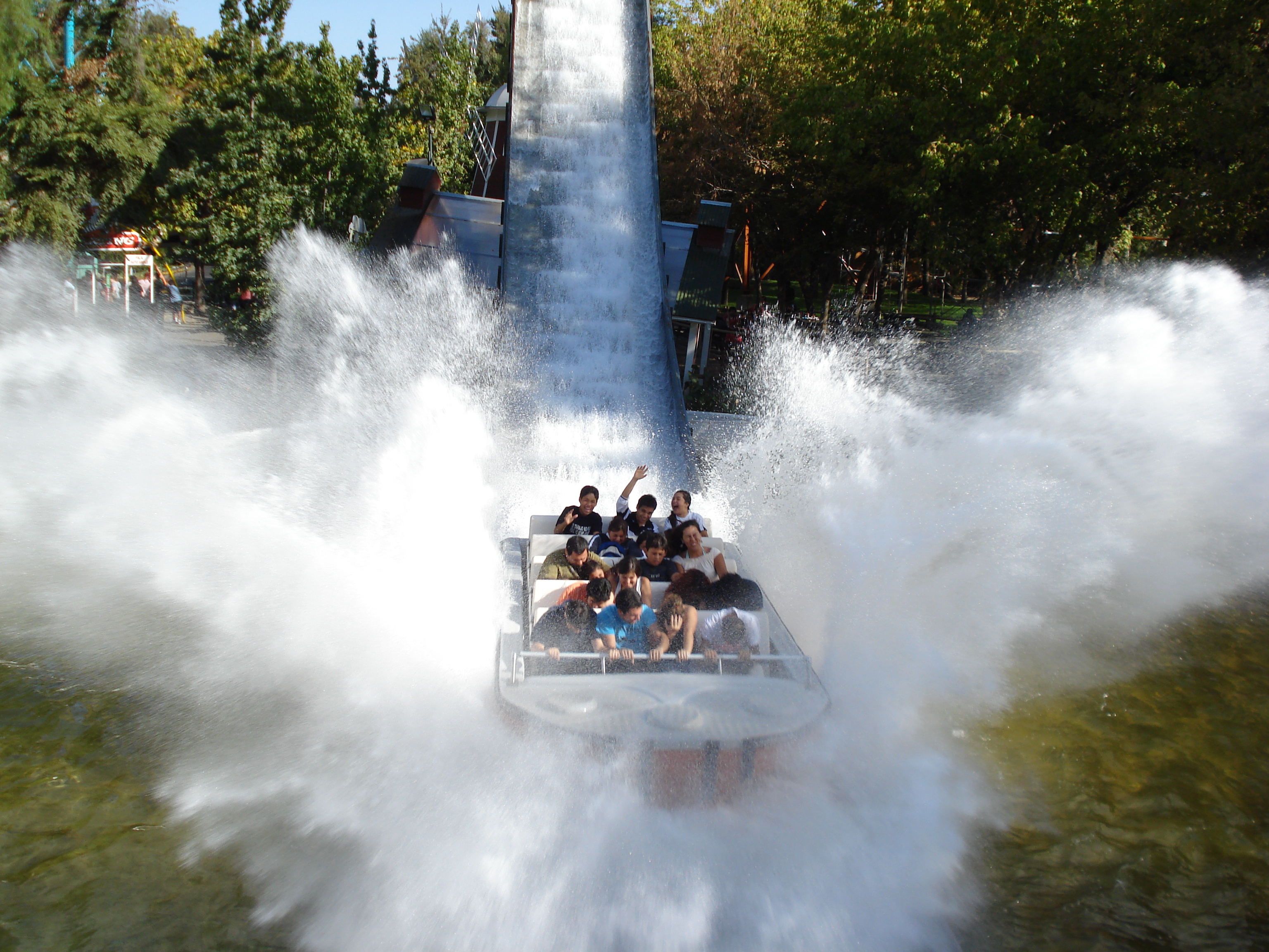 Nueva atraccion 2008 de Fantasilandia